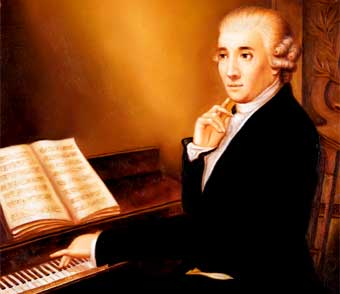 Frei verfügbares potrait von haydn